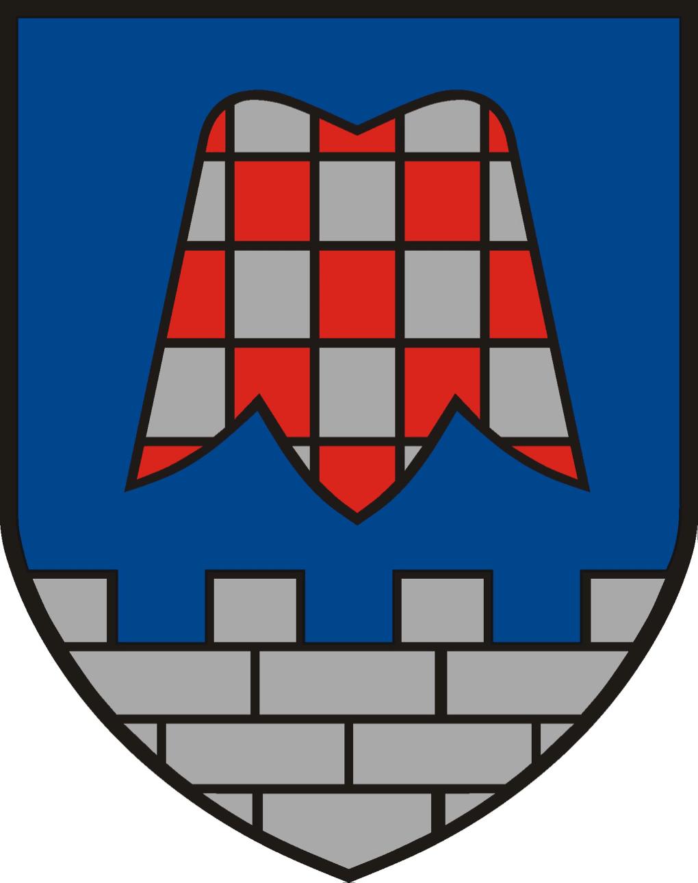 Das Gemeindewappen - Entstehung und Beschreibung Das Wappen der Gemeinde Großsteinbach – In einem blauen Schild mit silbernem gezinnten und gequaderten Schildfuß eine von Silber und Rot geschachte schwebende Glockenblume – wurde am 18. September 1966 von der Steiermärkischen Landesregierung verliehen. Das Wappen symbolisiert das Vergangene und das Ewige. Die Zinnenmauer nimmt Bezug auf einen Bericht im Herbersteiner Hand-Urbar (Grundbuch) von 1605, der besagt, daß im Gemeindegebiet einst ein Schlößl gestanden haben soll: "Ein abgeördetes Hölzl liegt im Steinbach, genannte Hausgraben, herinnerhalb der Kirchn, da etwan ein Schlößl gestanden." Das Ewige wird durch die Schachblume dargestellt, eine seltene eiszeitliche Glockenblume, die streng geschützt ist und in der Steiermark nur im Gebiet von Großsteinbach vorkommt.